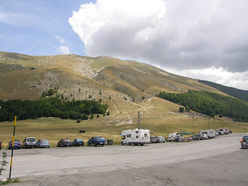 Passo Godi 2009